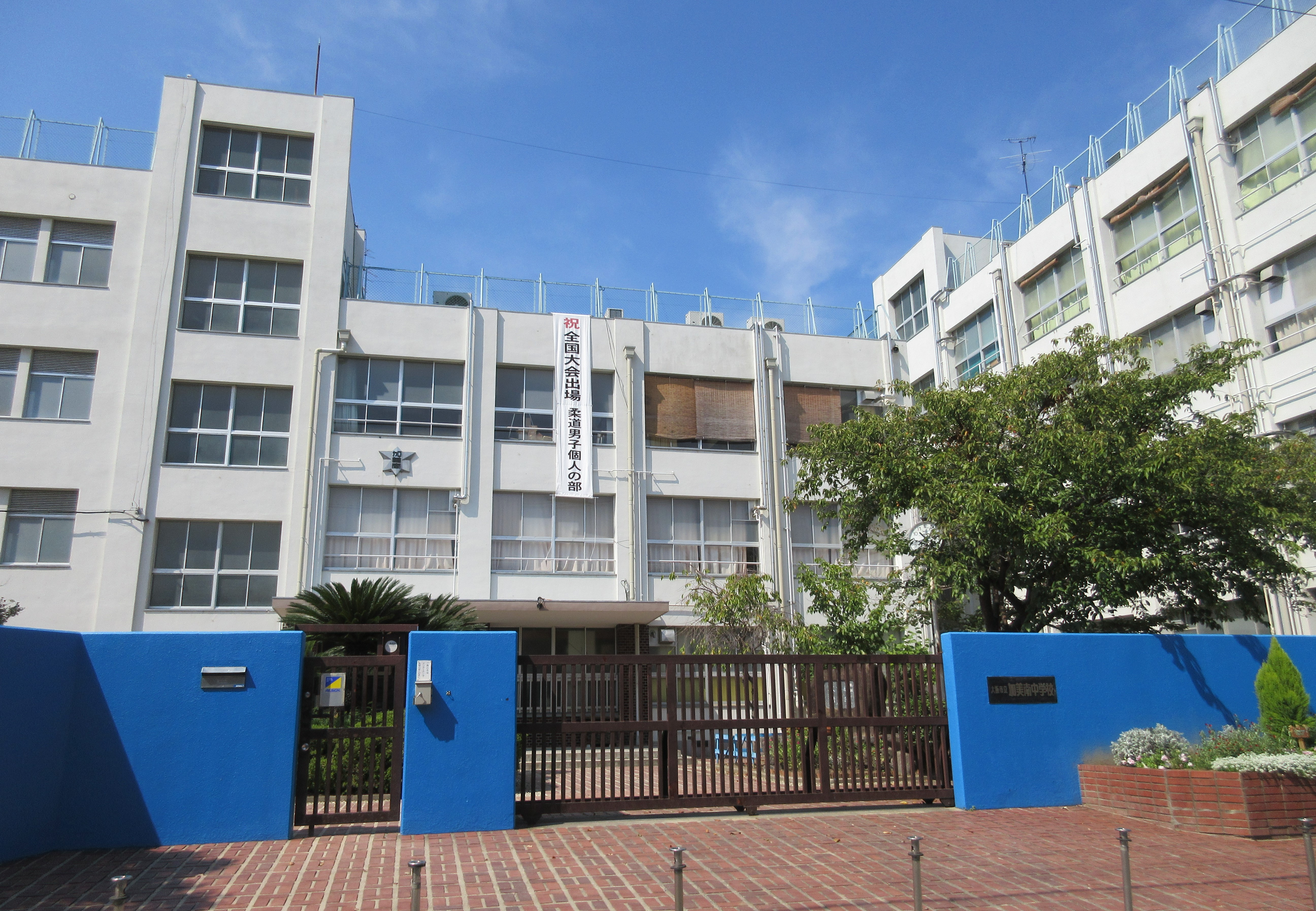 大阪市立加美南中学校